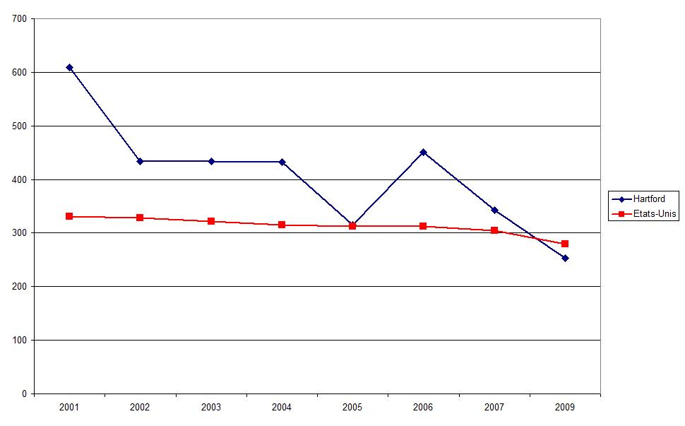 Indice de criminalité, à Hartford (Michigan) et dans l'ensemble des Etats-Unis.